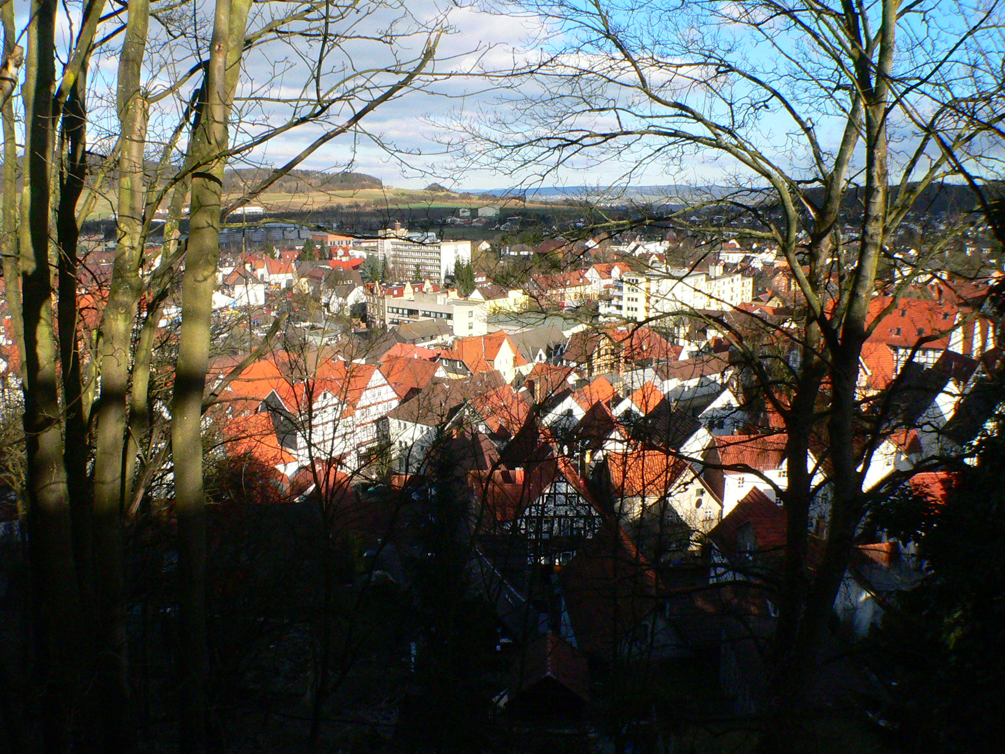 Gudensberg (Hessen), Stadtkern